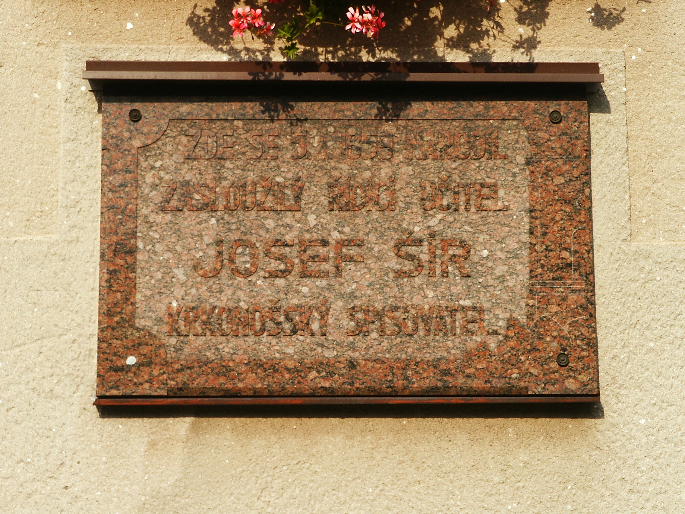 Pamětní deska spisovatele Josefa Šíra, Horní Branná 27